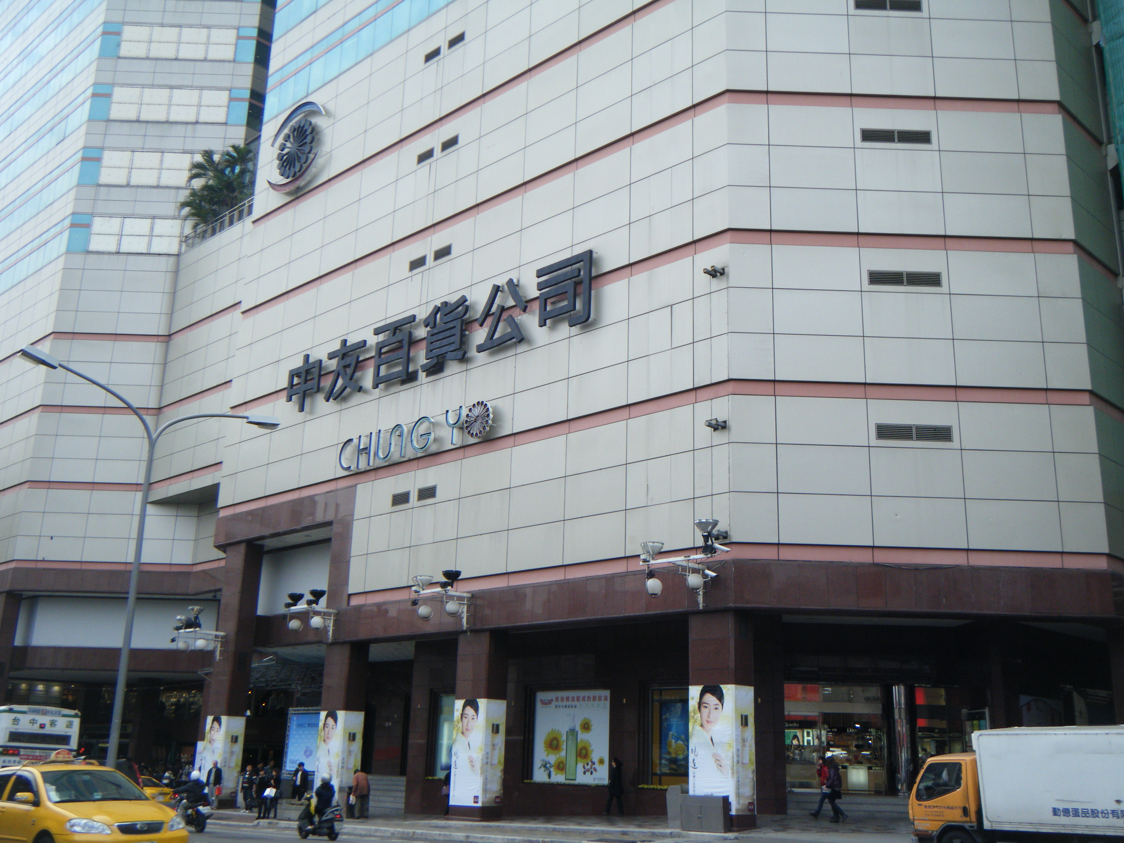 中友百貨